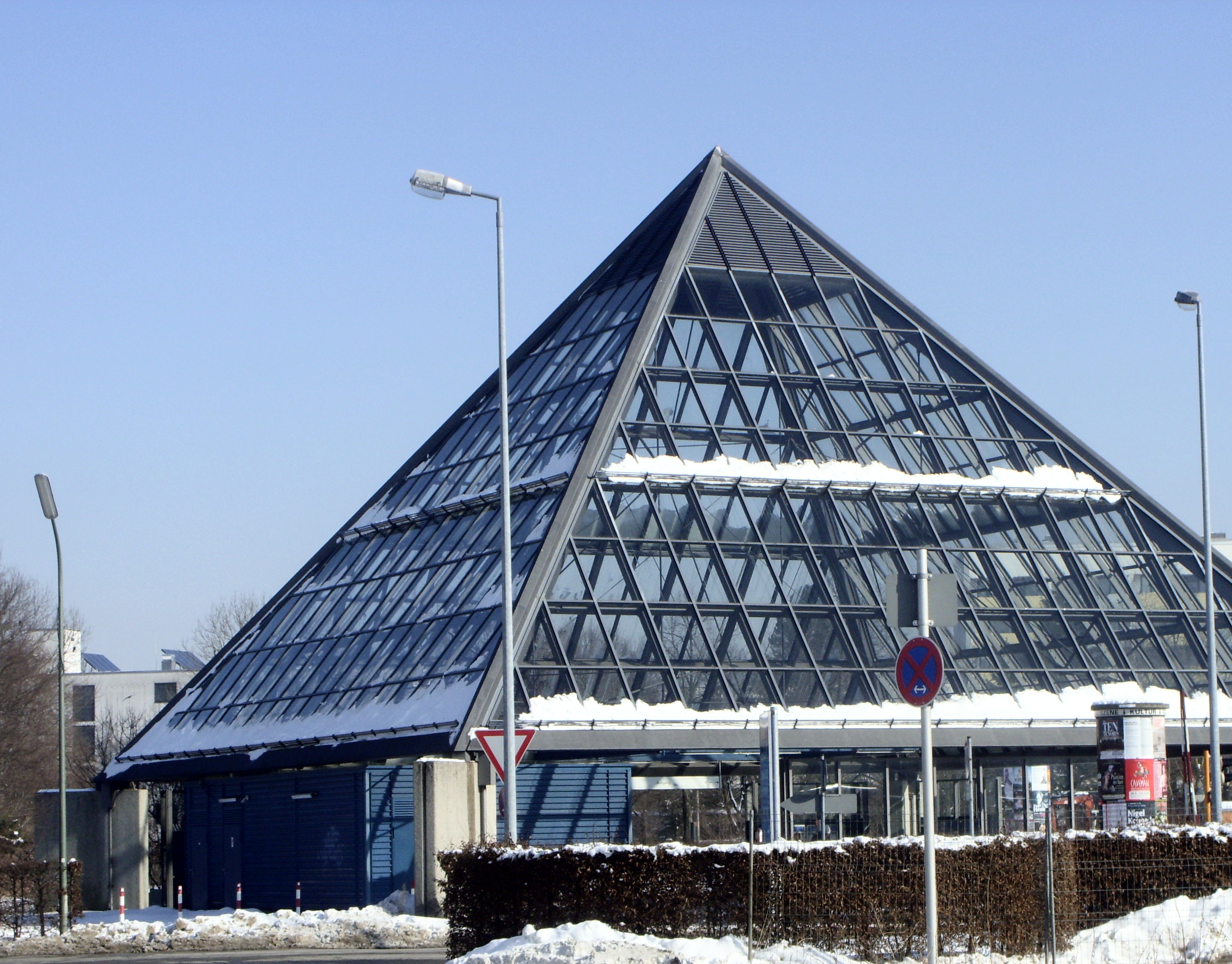 Glaspyramide über dem Eingang zur U-Bahn Haltestelle Klinikum Großhadern